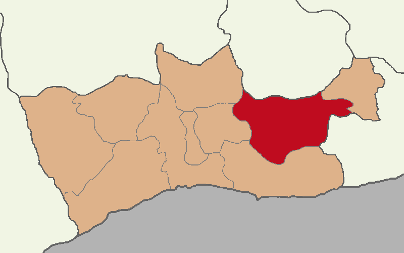 Midyat ilçesinin konumu